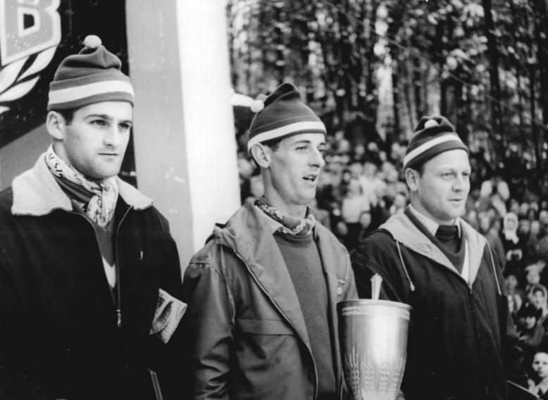 Zentralbild Löwe 24.2.1958 Deutsche Skimeisterschaften in Altenberg beendet In Altenberg wurden am Sonntag, dem 23.2.1956, die Nordischen Deutschen Skimeisterschaften mit dem Spezialsprunglauf beendet. Deutscher Meister im Springen wurde Harry Glass (Dynamo Klingenthal) vor Helmut Recknagel (Motor Zella-Mehlis) und Titelverteidiger Werner Lesser (Dynamo Brotterode). UBz: nach der Siegerehrung im Spezialsprunglauf. Wir erkennen von links nach rechts: Recknagel, Glass und Lesser.